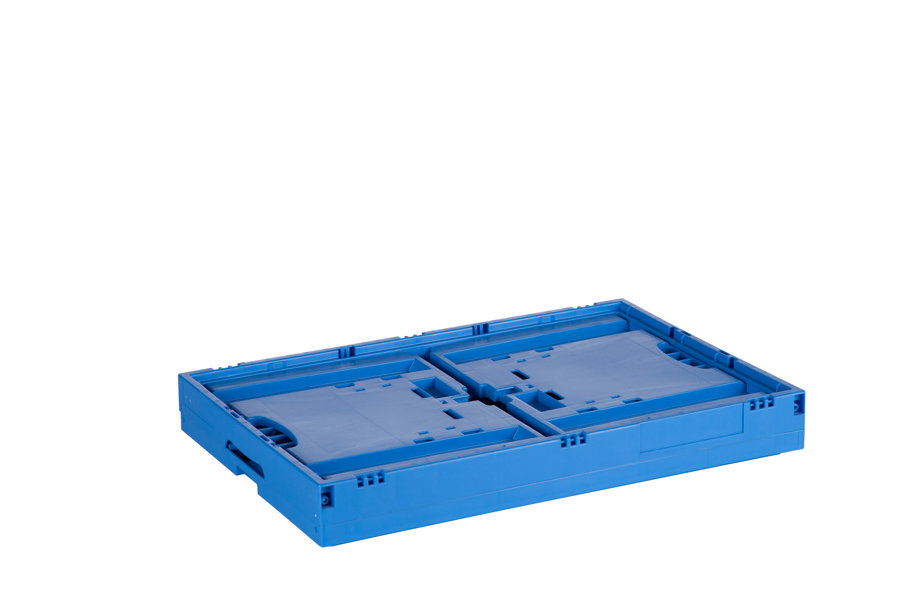 Faltbehälter im zusammengelegten Zustand.